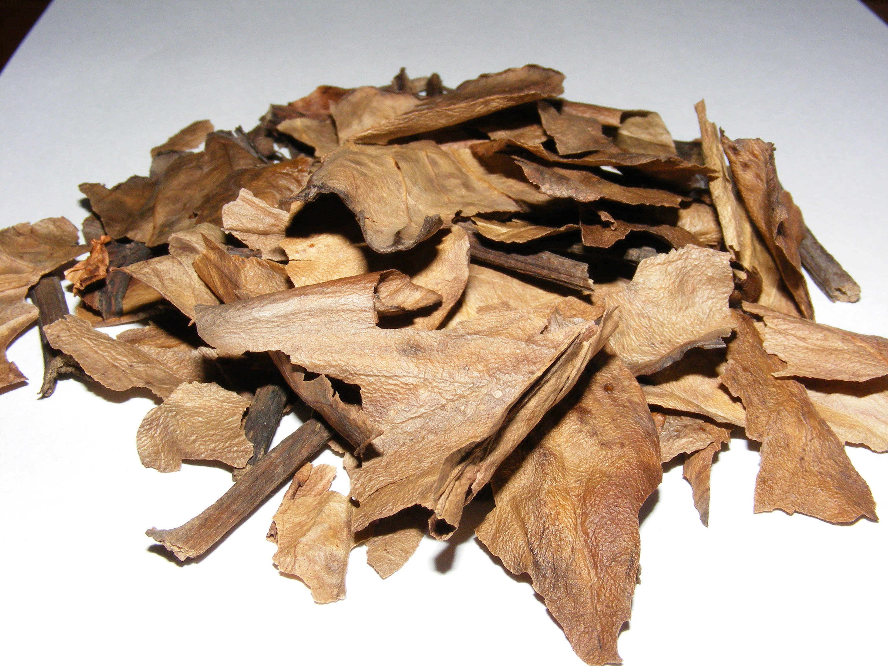 Куски сухих прошлогодних листьев бадана (Bergenia crassifolia), из которых делают "монгольский чай"